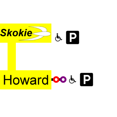 plan de la liogne jaune du L